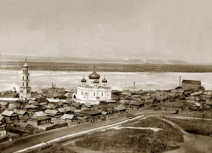 Вид на Иверский женский монастырь со строящегося кафедрального собора.